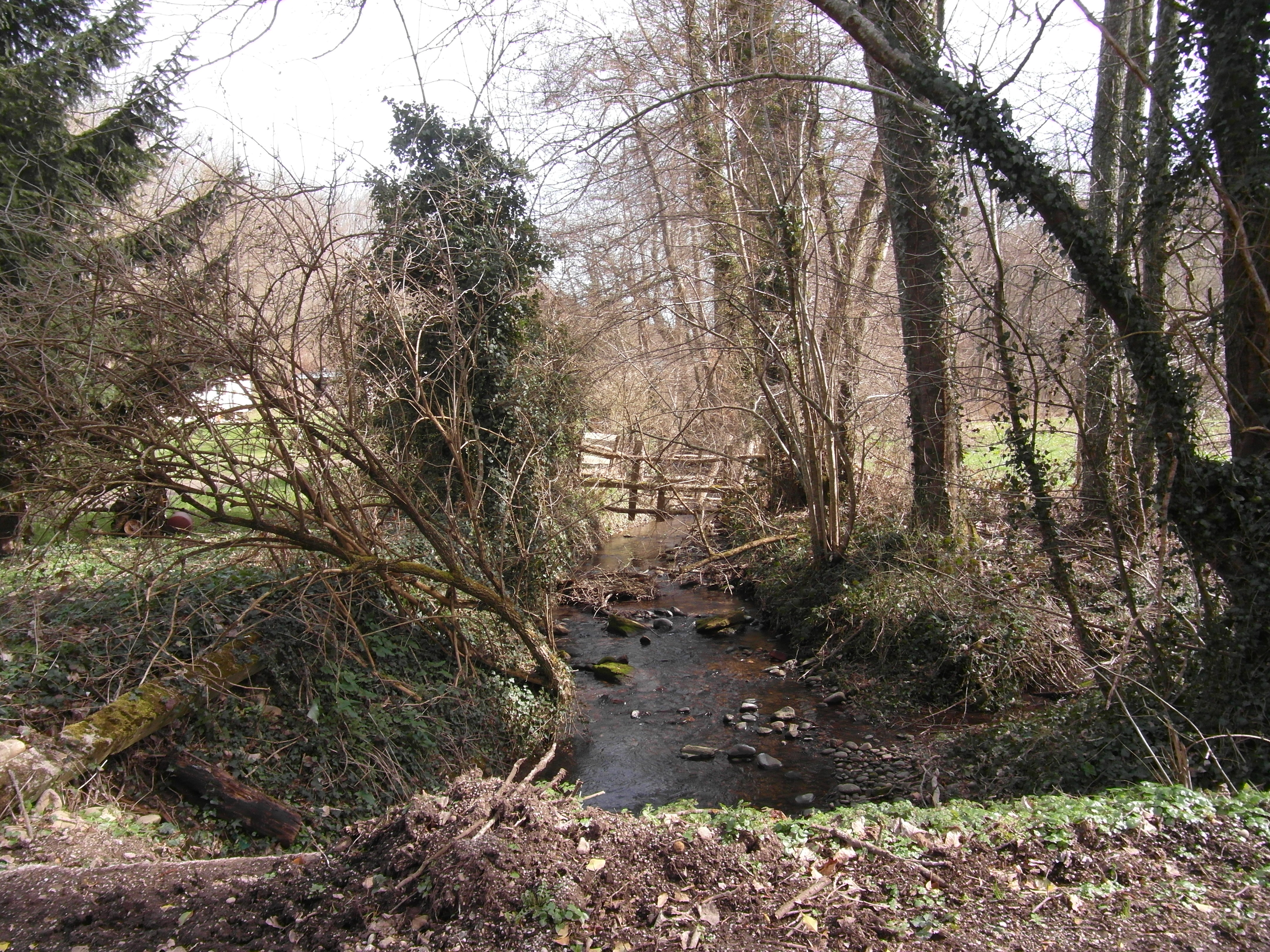 La Gère près du site de l'ancienne abbaye de Bonnevaux en mars 2019